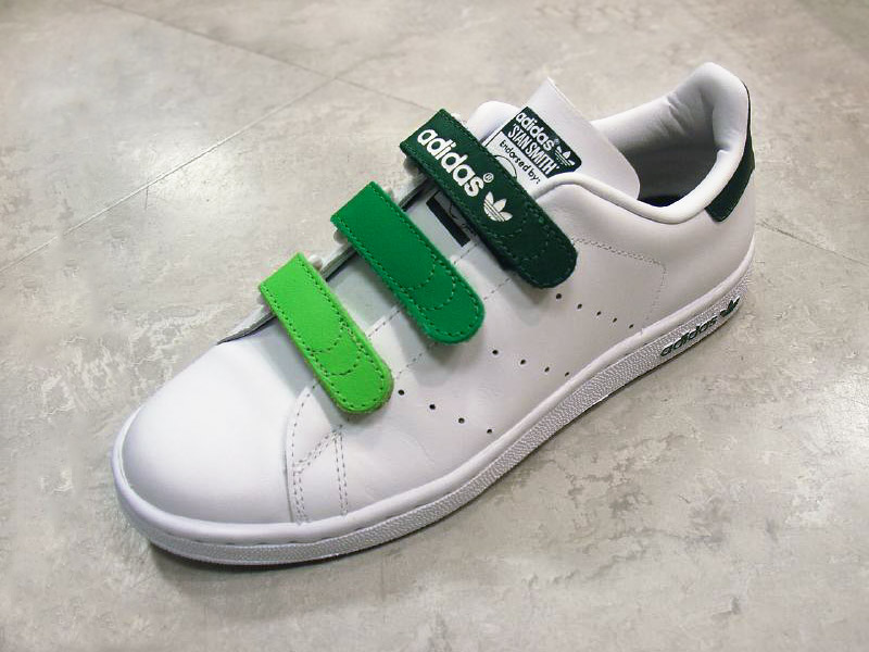 Sneaker using velcro fasteners